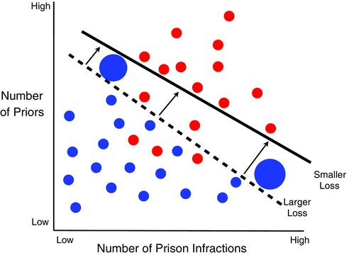 Монгол: 12